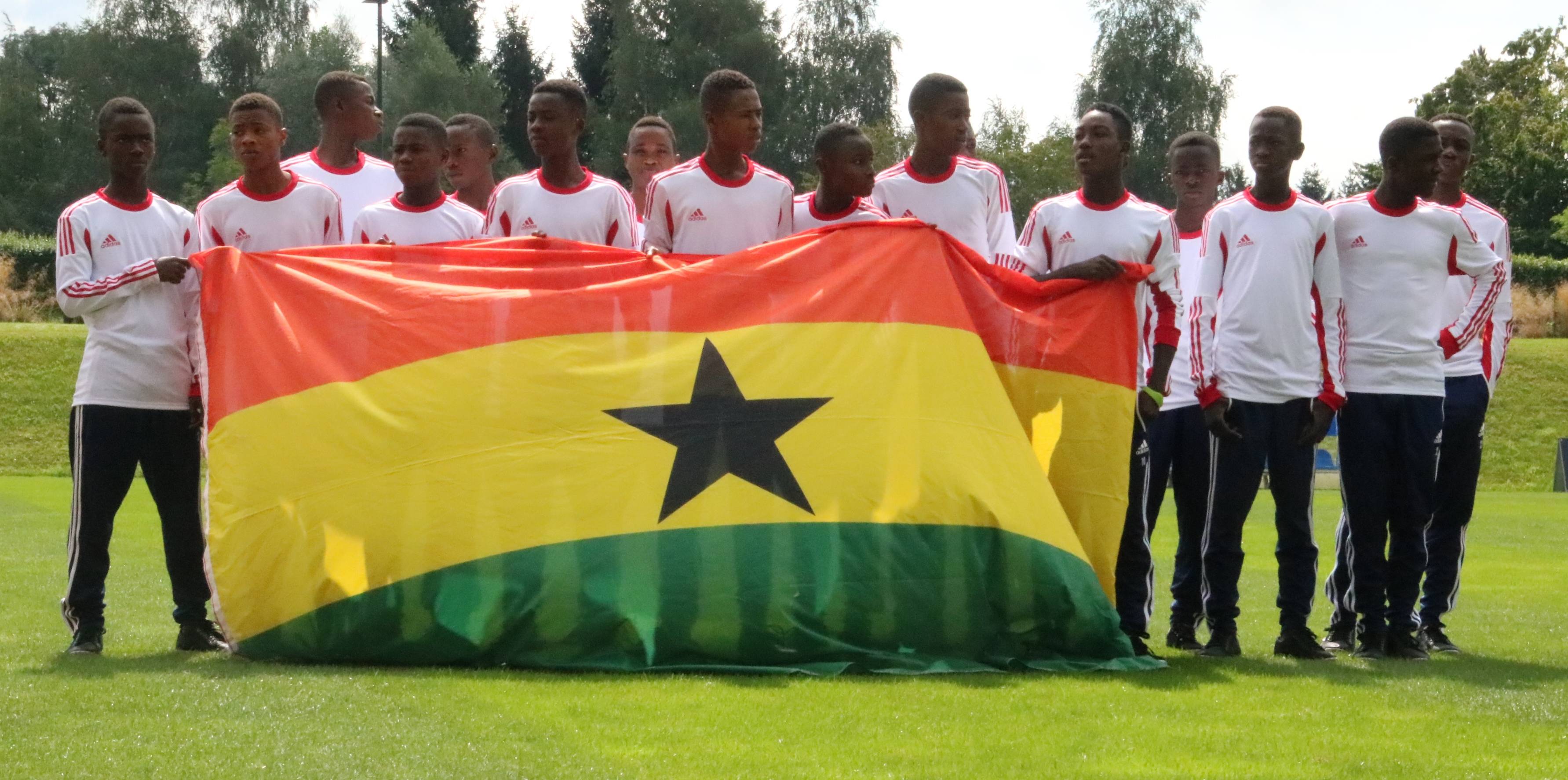 Teilnehmer der Next Generation Trophy 2016 des FC Red Bull Salzburg